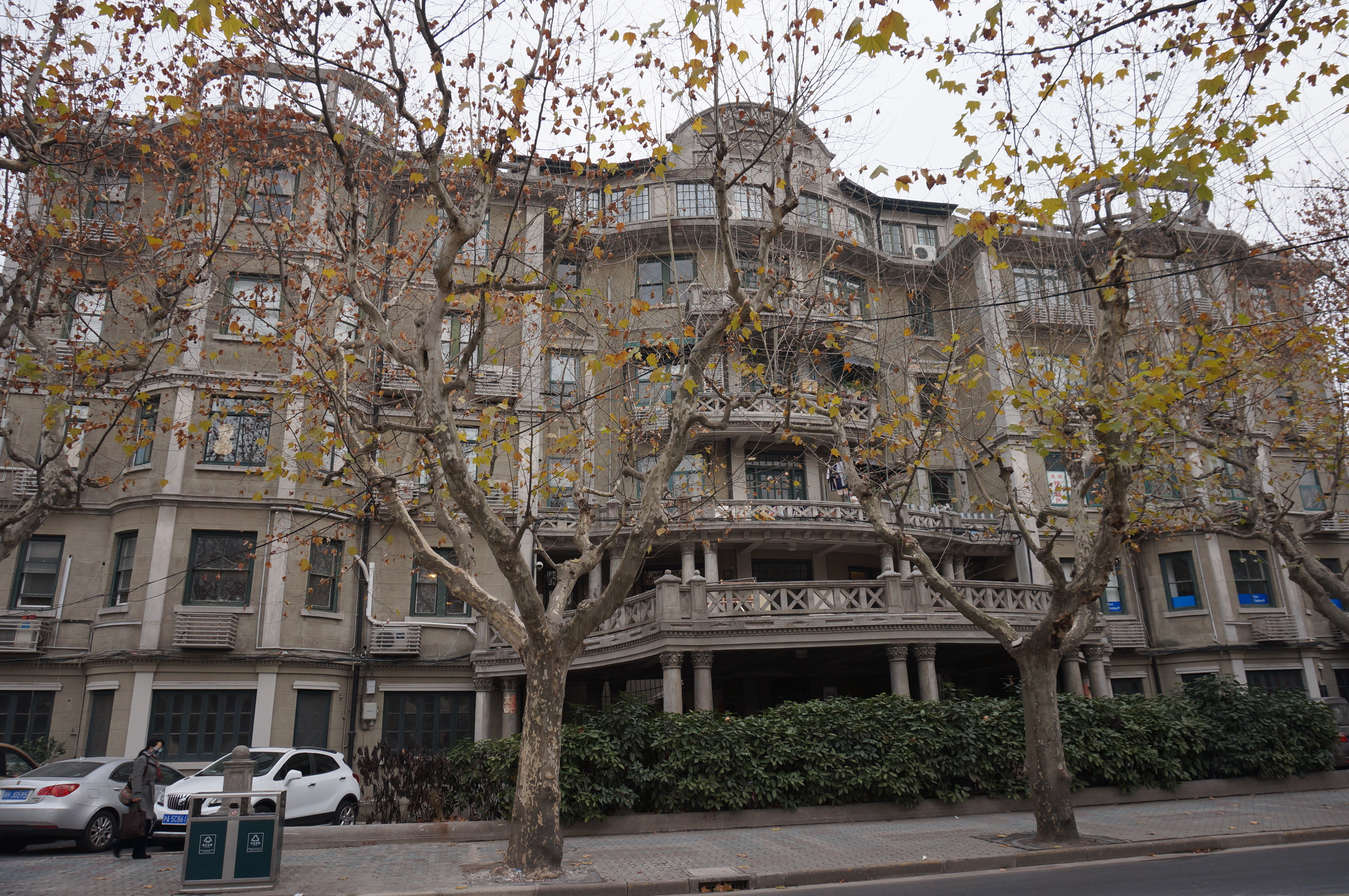 复兴中路黑石公寓